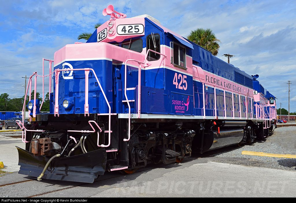 FEC Train